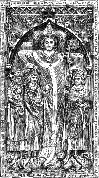 Erzbischof von Mainz, Peter von Aspelt (1306-1320), Grabmal im Dom zu Mainz.